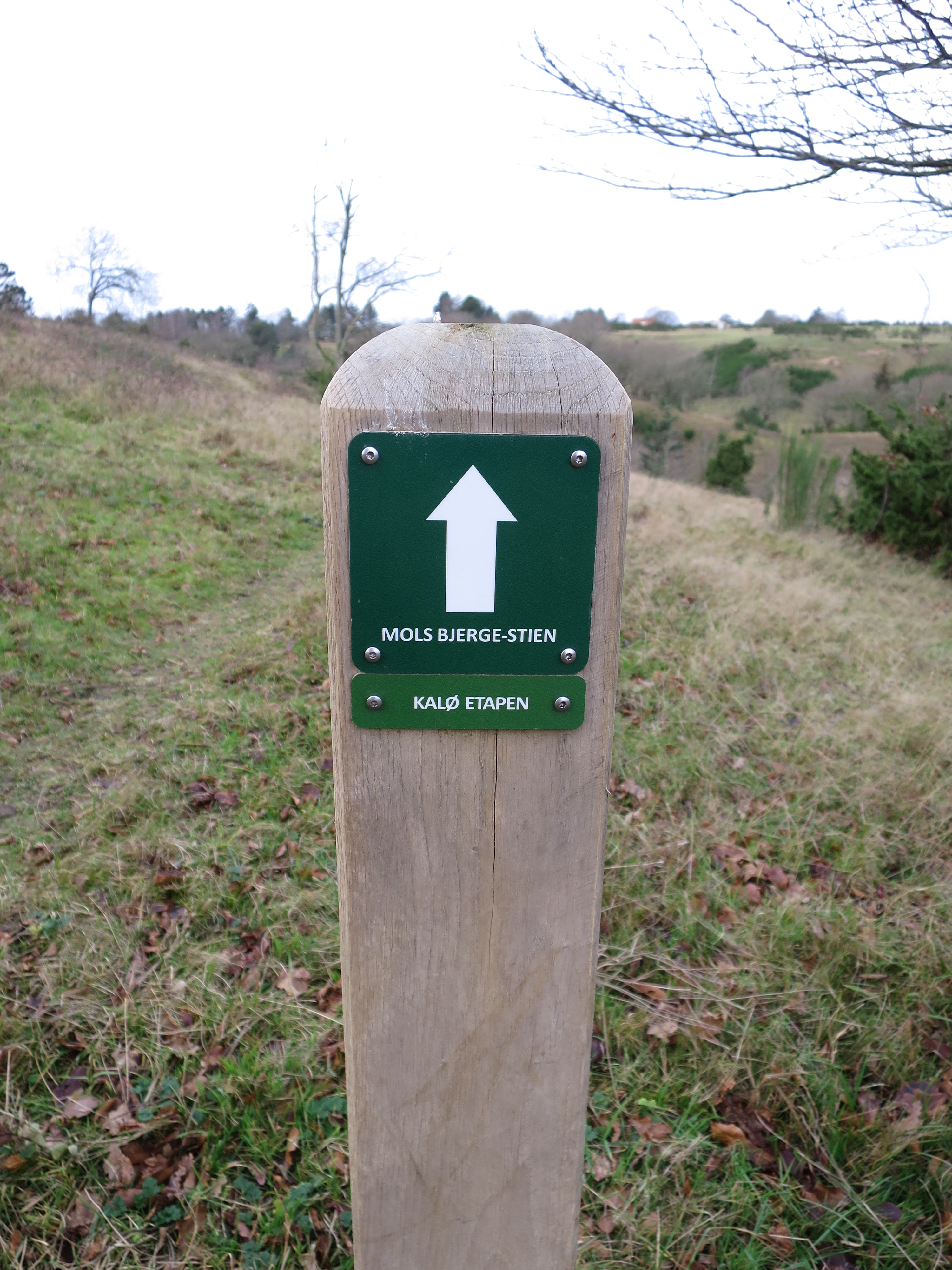 Skiltning af Mols Bjerge-stien, Kaløetapen mellem Femmøller og Kalø Slotsruin.